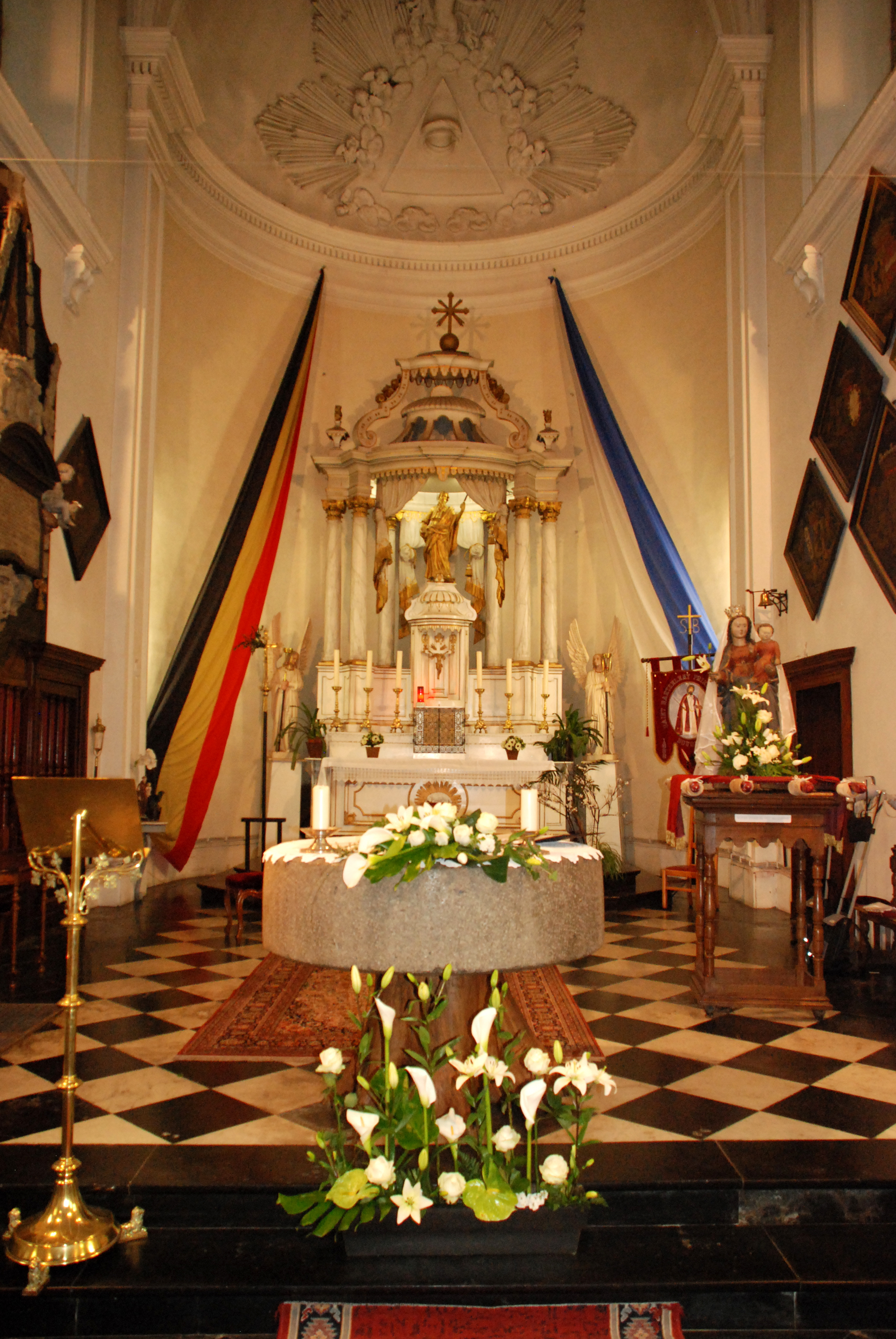 Belgique - Bousval - Église Saint-Barthélemy de Bousval